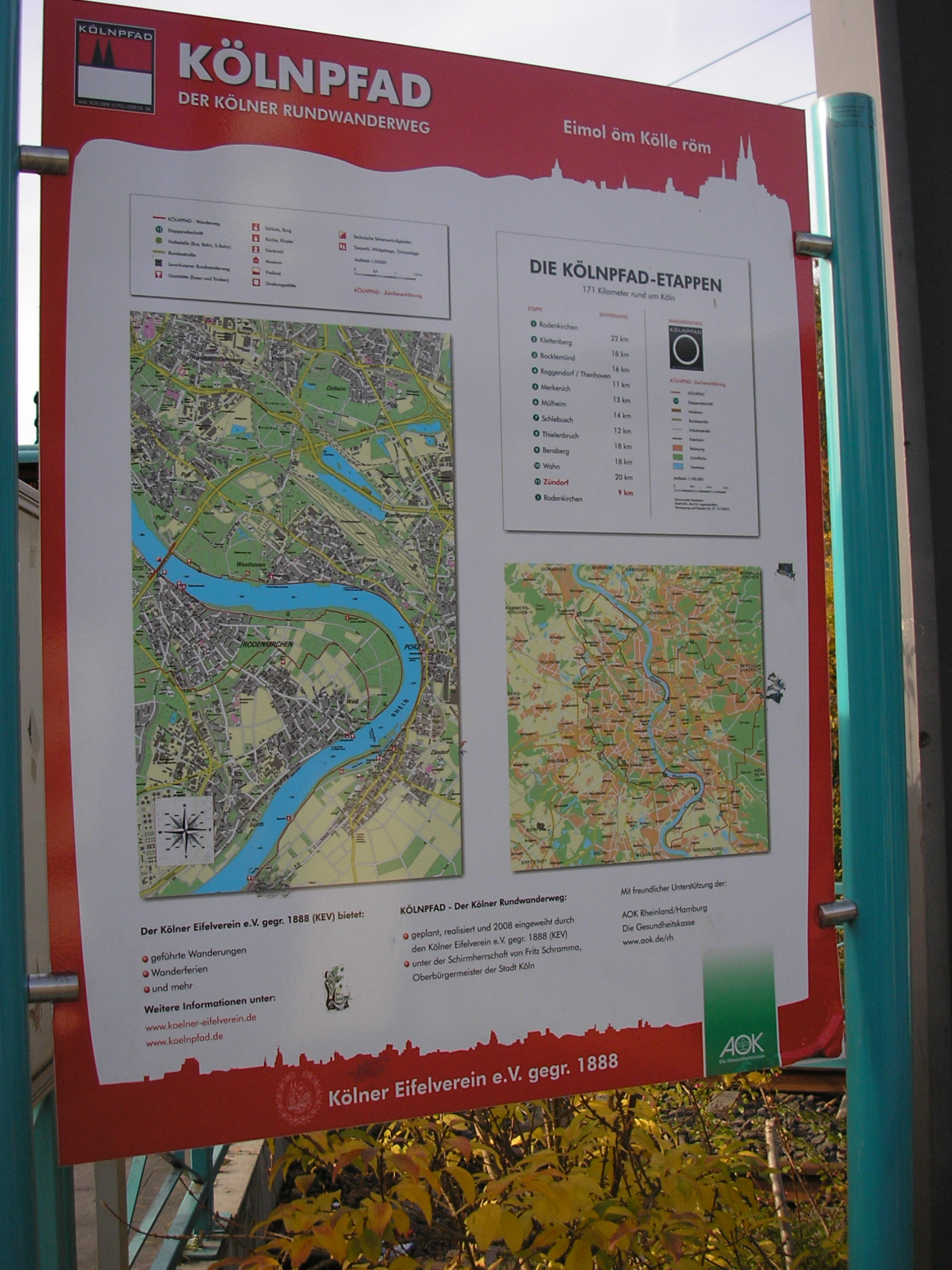 Kölnpfad - der Rundwanderweg um Köln. Teilstrecken im Kölner Süden, Tafel an der KVB-Endstation in Köln-Zündorf. Ripoarisch: Eimol öm Kölle röm